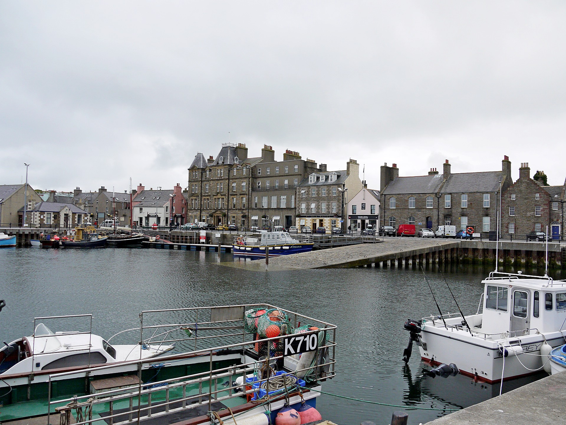 Centre-ville de Kirkwall vu du port de pêche.